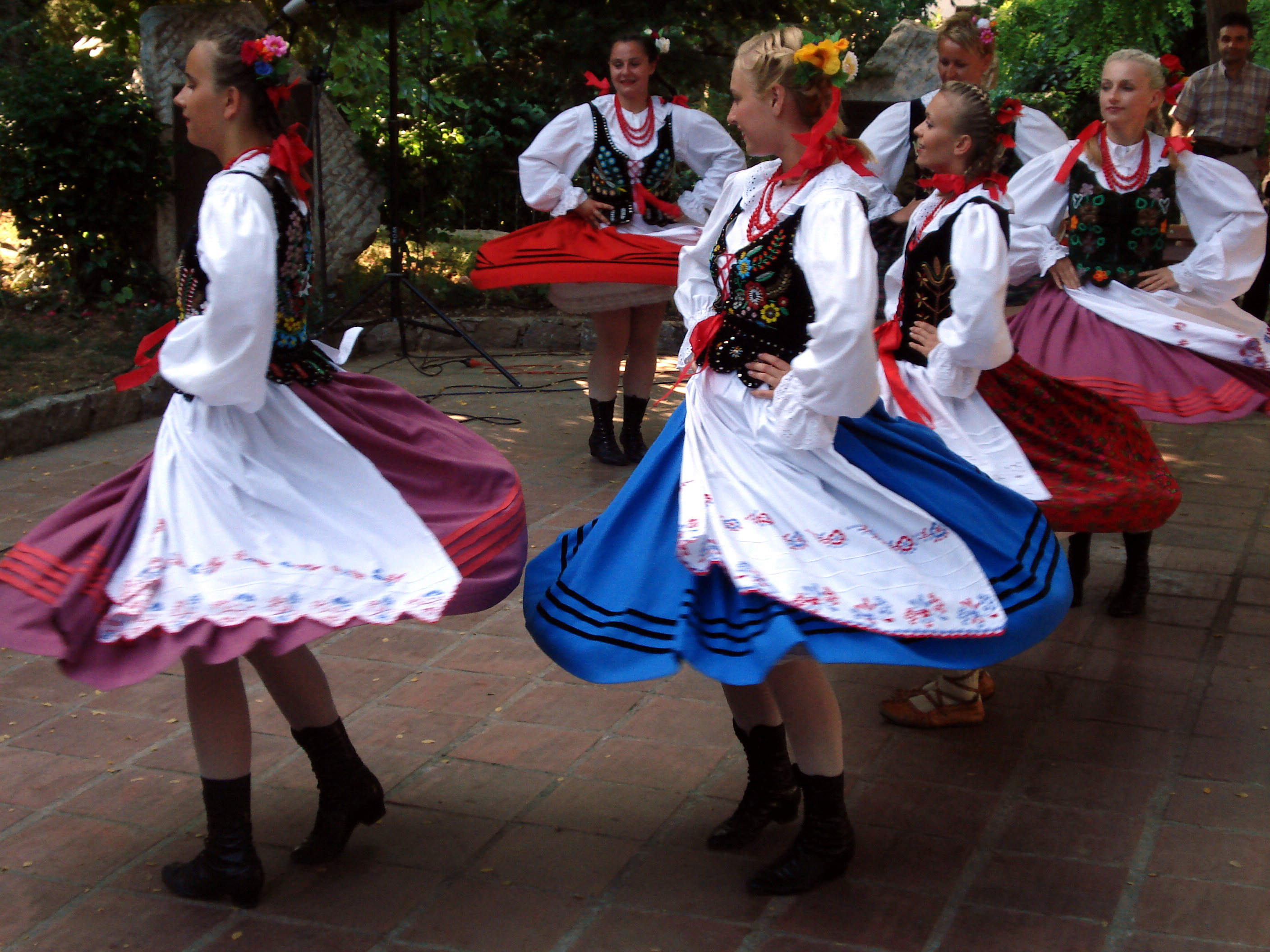 Polonezköy "Kiraz" Festival, Wałbrzych group